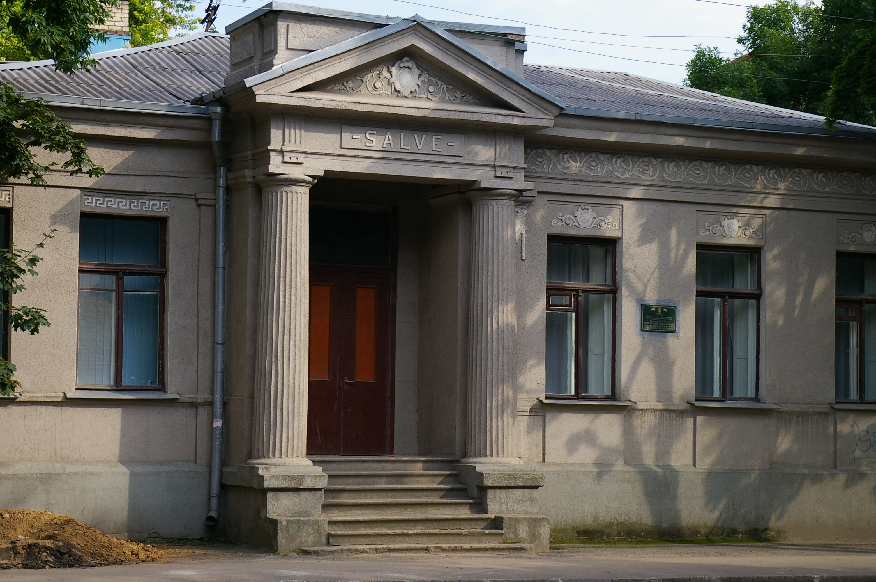 Харьков